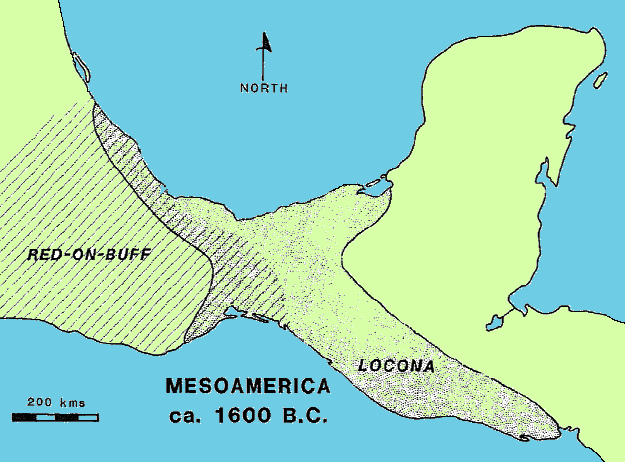 Intercambio Comercial entre Centroamérica y Mesoamerica